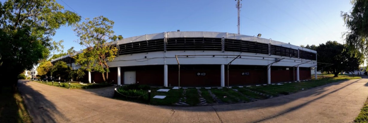 HCD Fcio Varela